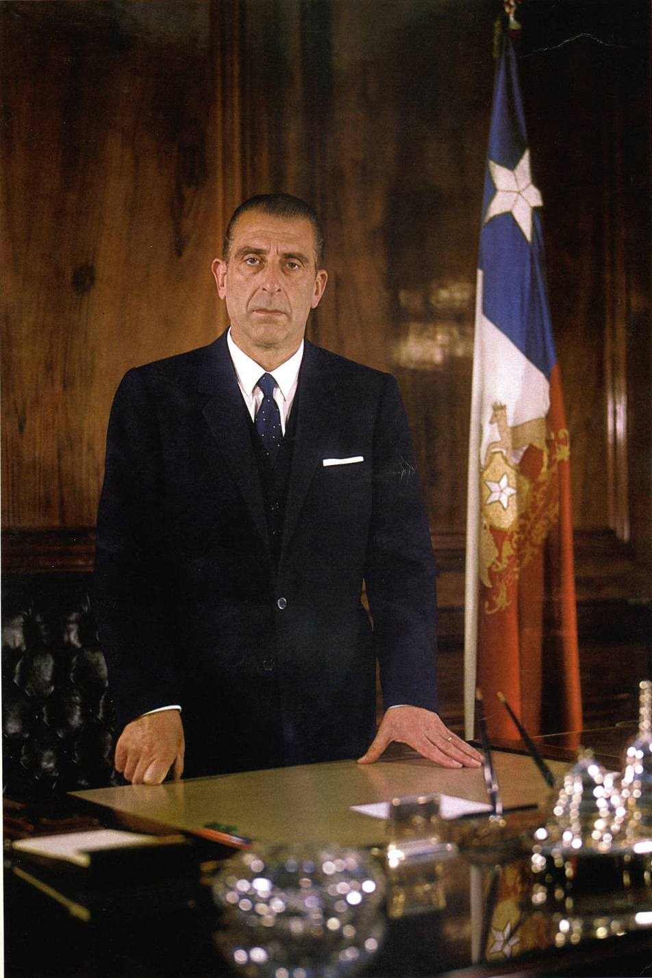 1964. Foto oficial en su escritorio en La Moneda a color.